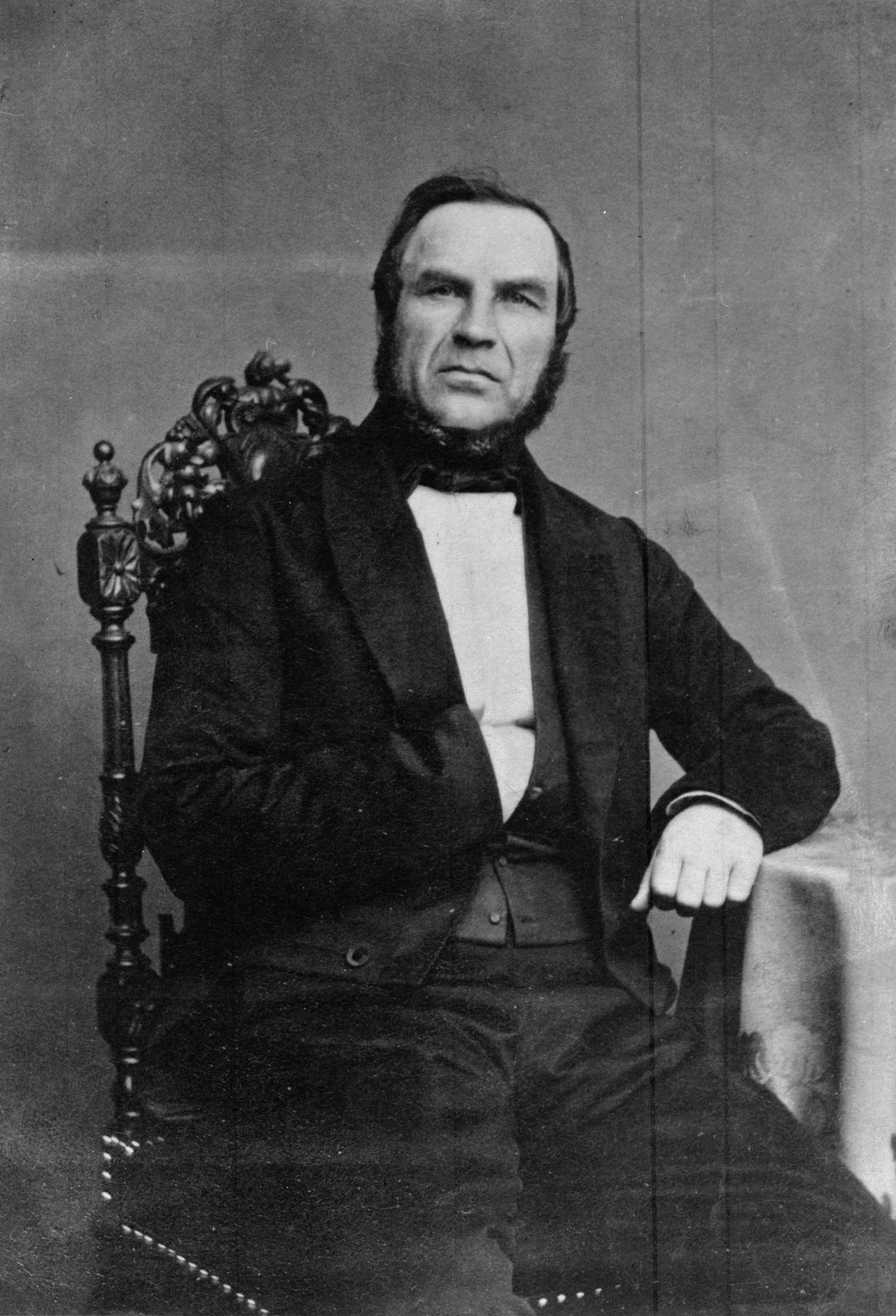 Peter Andreas Sæther (1812–1897), stortingsmann for Nordre Trondhjems amt 1851–1853 og 1857–1879.